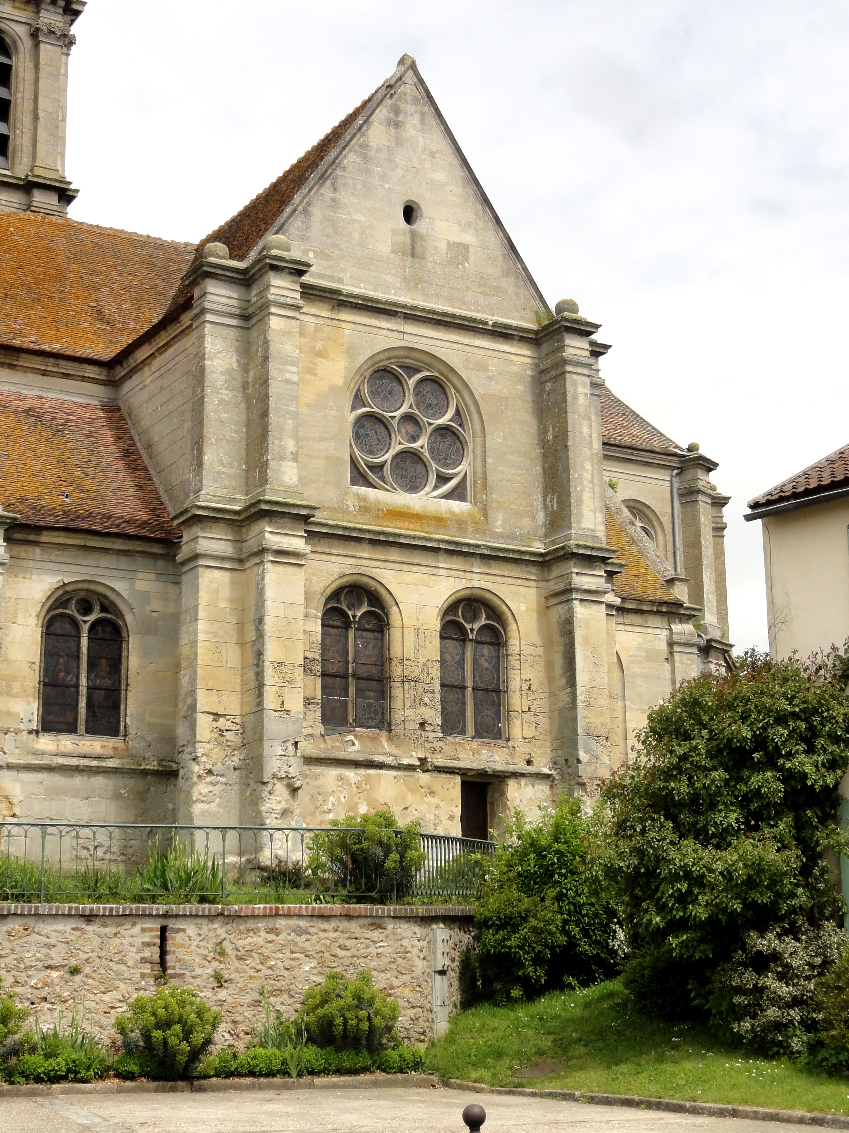 Croisillon sud.